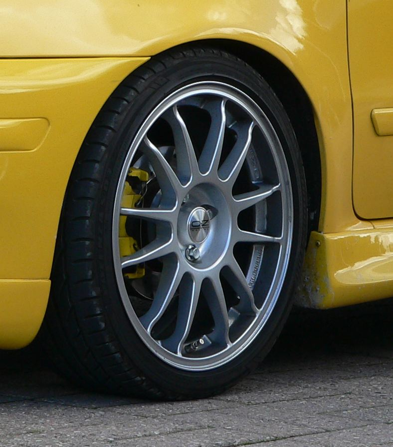 Alufelge, selbst fotografiert